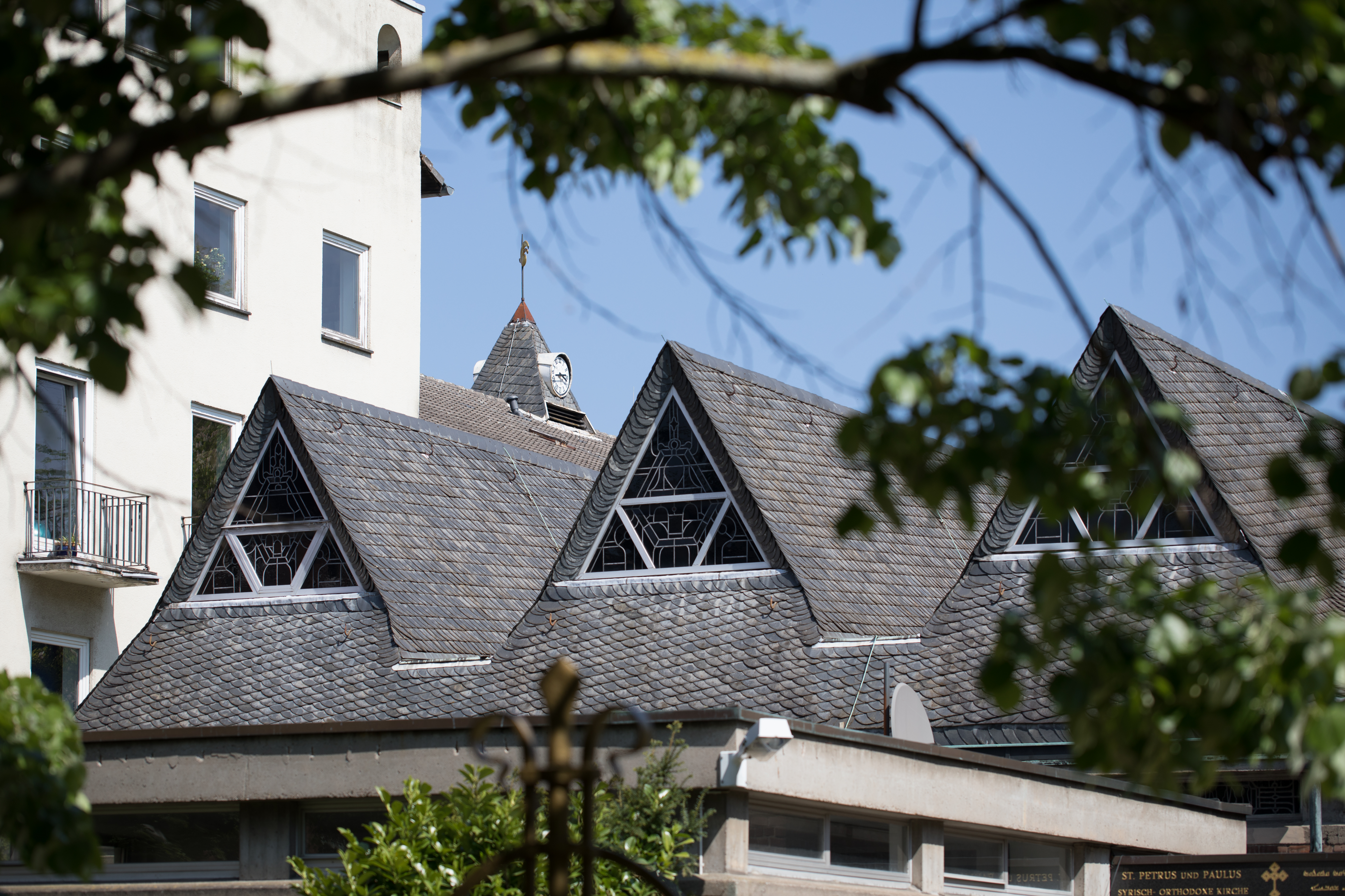 Kirche St. Petrus und Paulus, ursprünglich Klosterkirche Vom Guten Hirten, Köln-Lindenthal; Architekt: Fritz Schaller